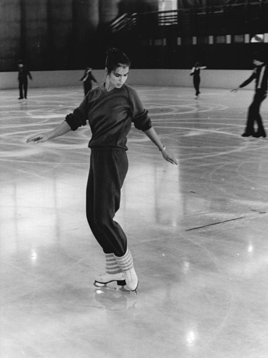 Katarina Witt ADN-ZB Thieme 25.12.1984 Karl-Marx-Stadt: Eisballerina Katarina Witt.- Mit höchster Konzentration werden die Pflichtfiguren immer und immer wieder probiert. Vor dem Preis kommt der Fleiß. Und die Pflicht ist der Grundstein zum späteren Medaillengewinn. Die 19-jährige Oberschülerin Katarina Witt (SC Karl-Marx-Stadt) hatte 1984 ihre bisher erfolgreichste Eiskunstlauf-Saison. Sie wurde Olympiasiegerin, Welt- und Europameisterin und holte sich am 22.12.1984 in Berlin den fünften DDR-Meistertitel in Folge. Siehe auch Motive 1984-1225-8 N, 9 N, 10 N und 12 N.